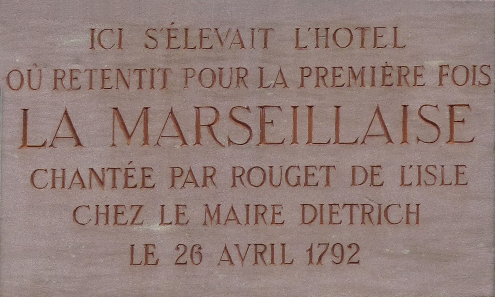 Plaque commémorative "La Marseillaise" sur la façade de la Banque de France, place Broglie, Strasbourg.